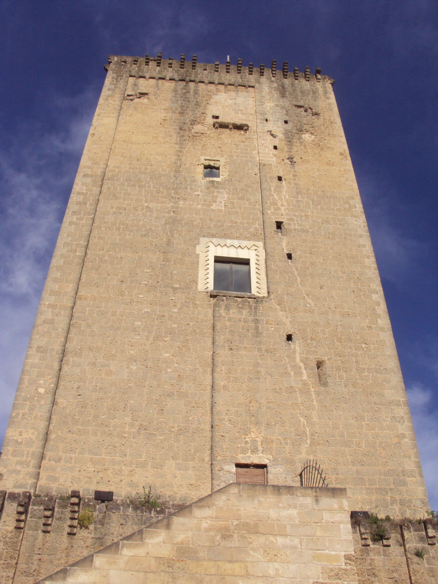 La Torre Federiciana à Leverano, province de Lecce, Pouilles, Italie